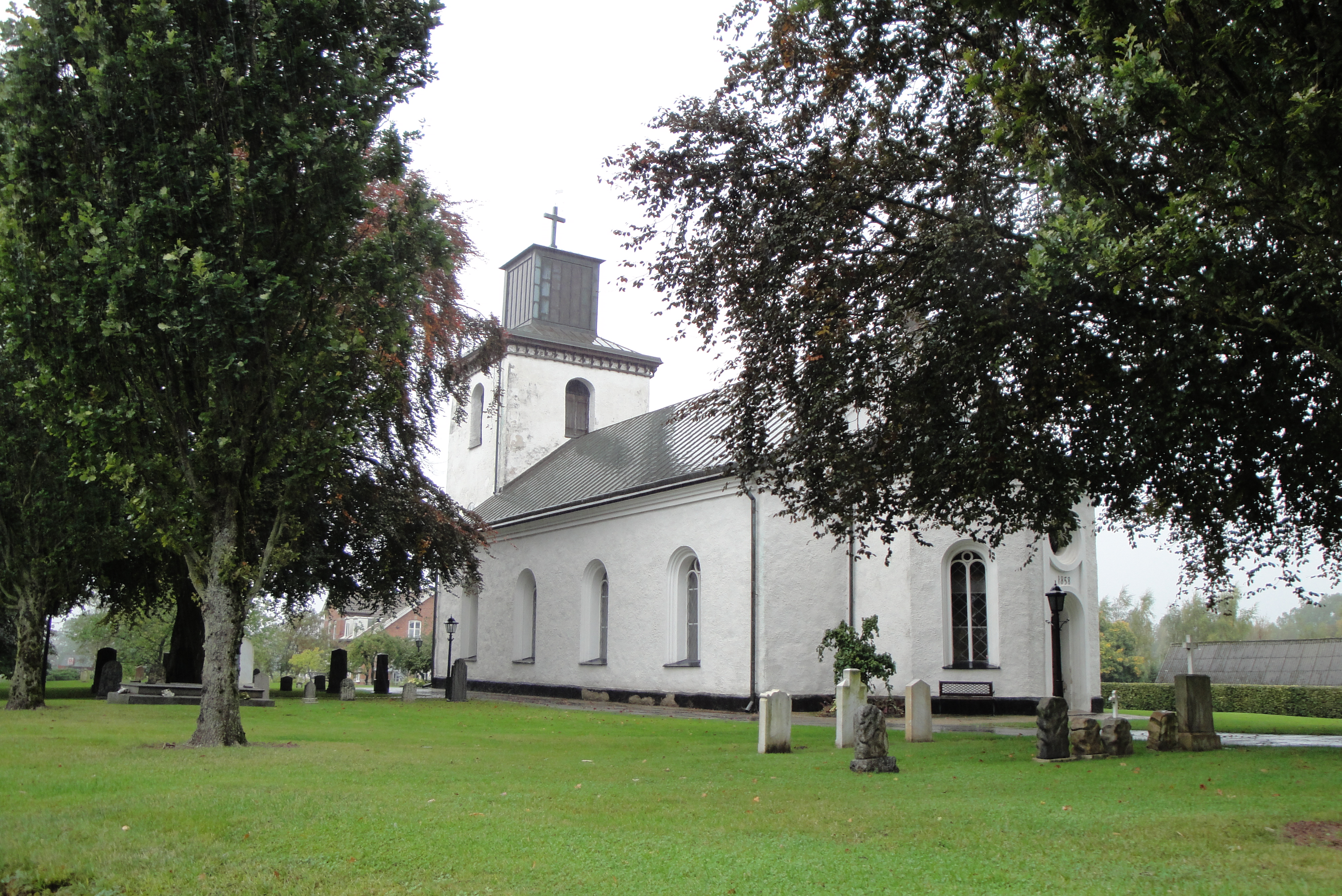 Östra Ljungby kyrka (Östra Ljungby 32:1)